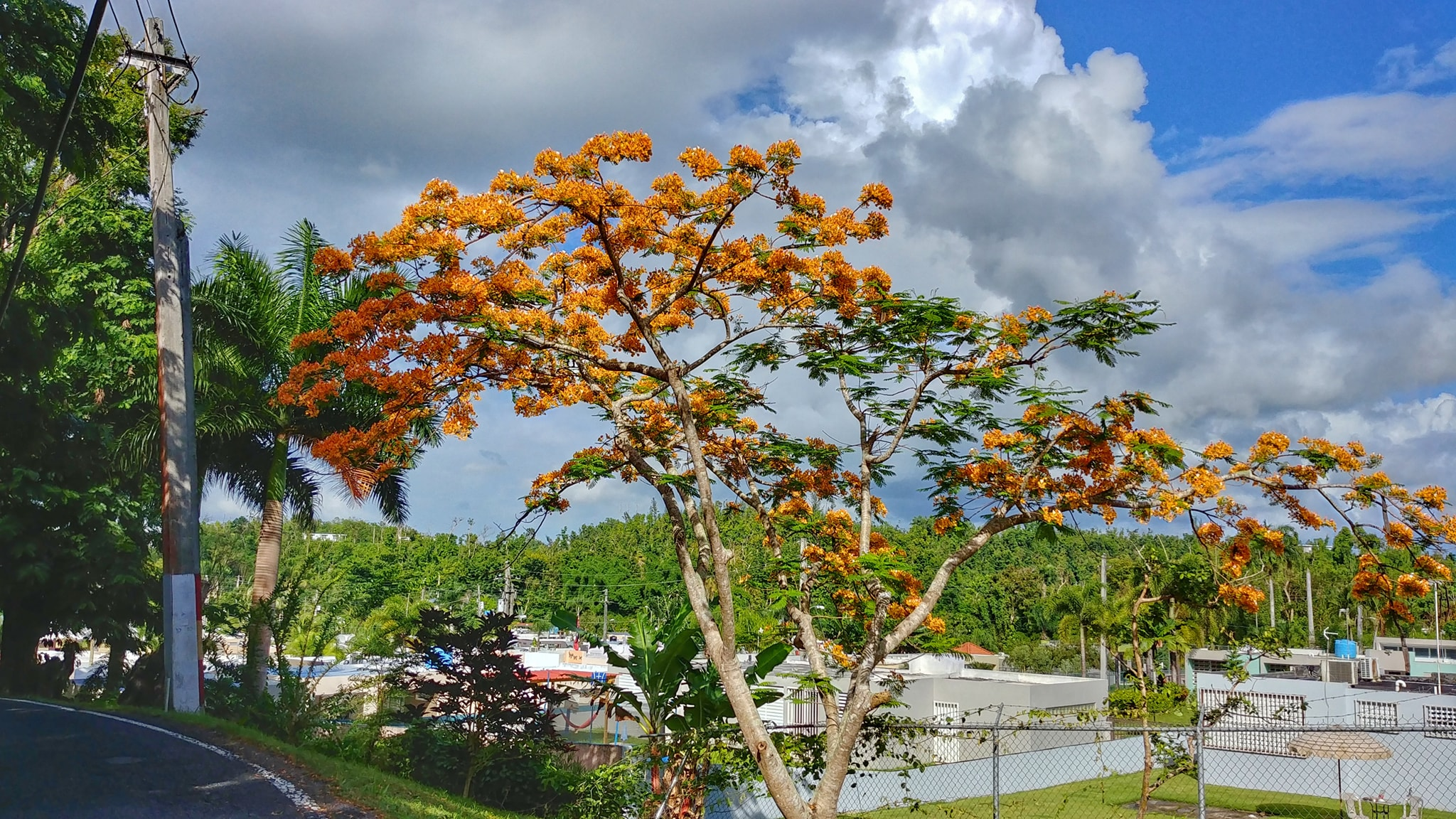 Barrio Quebrada Arenas, Toa Alta, Puerto Rico (2019)